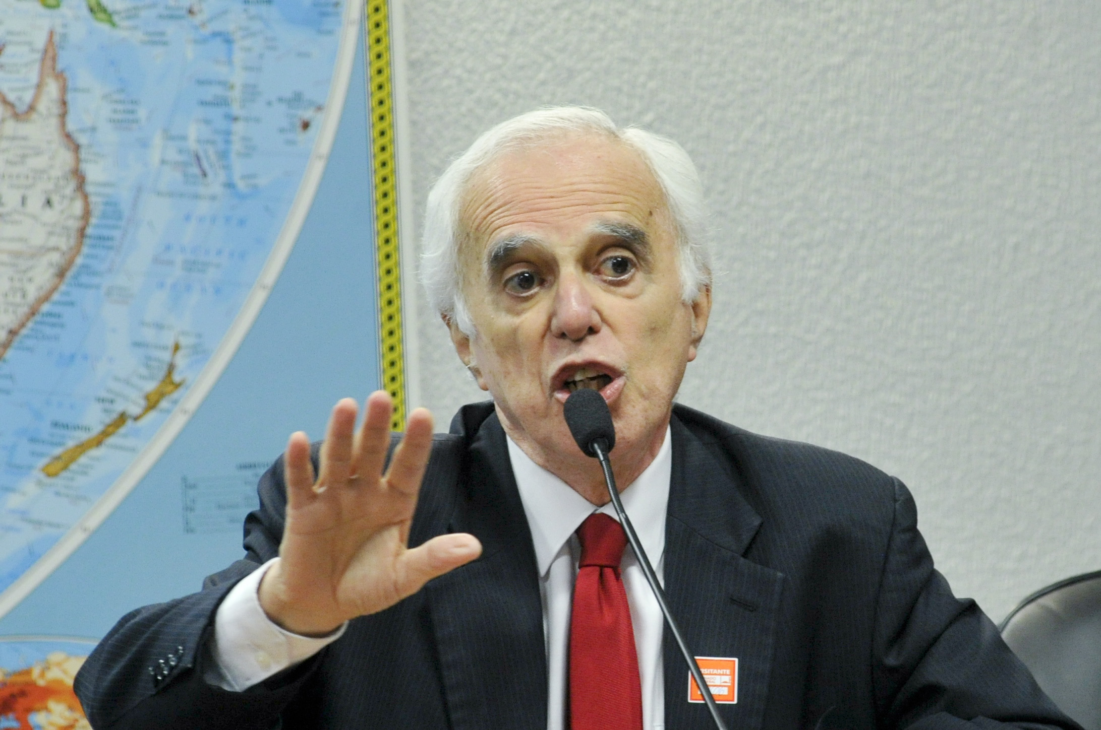 A Comissão de Relações Exteriores e Defesa Nacional (CRE) realiza audiência pública Interativa para tratar sobre os rumos da atual política externa brasileira. Em pronunciamento, embaixador, Samuel Pinheiro Guimarães. Foto: Geraldo Magela/Agência Senado